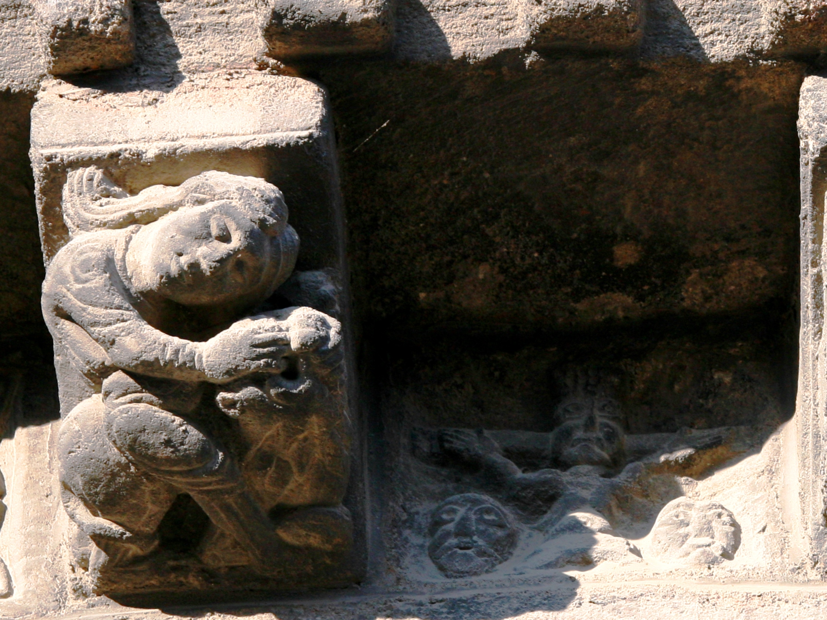 Samson et le lion v.1180 et la crucifixion de Jésus-Christ